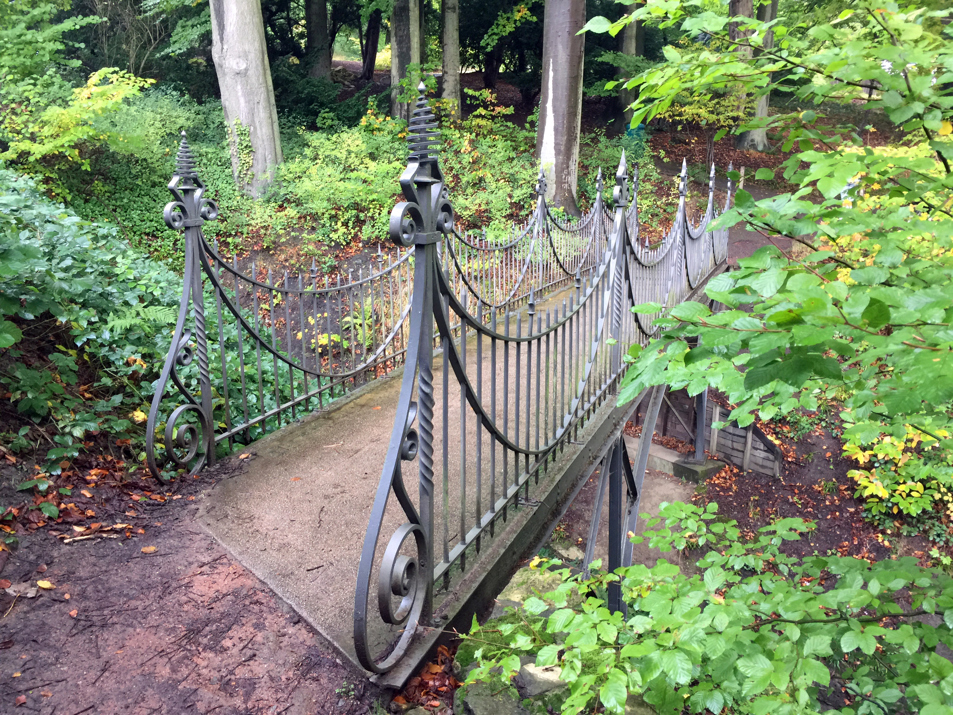 The bridge of Park-Solvay